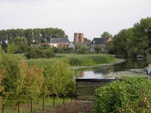 foto gemaakt vanaf een van de toegangswegen naar Acquoy in de zomer van 2003.